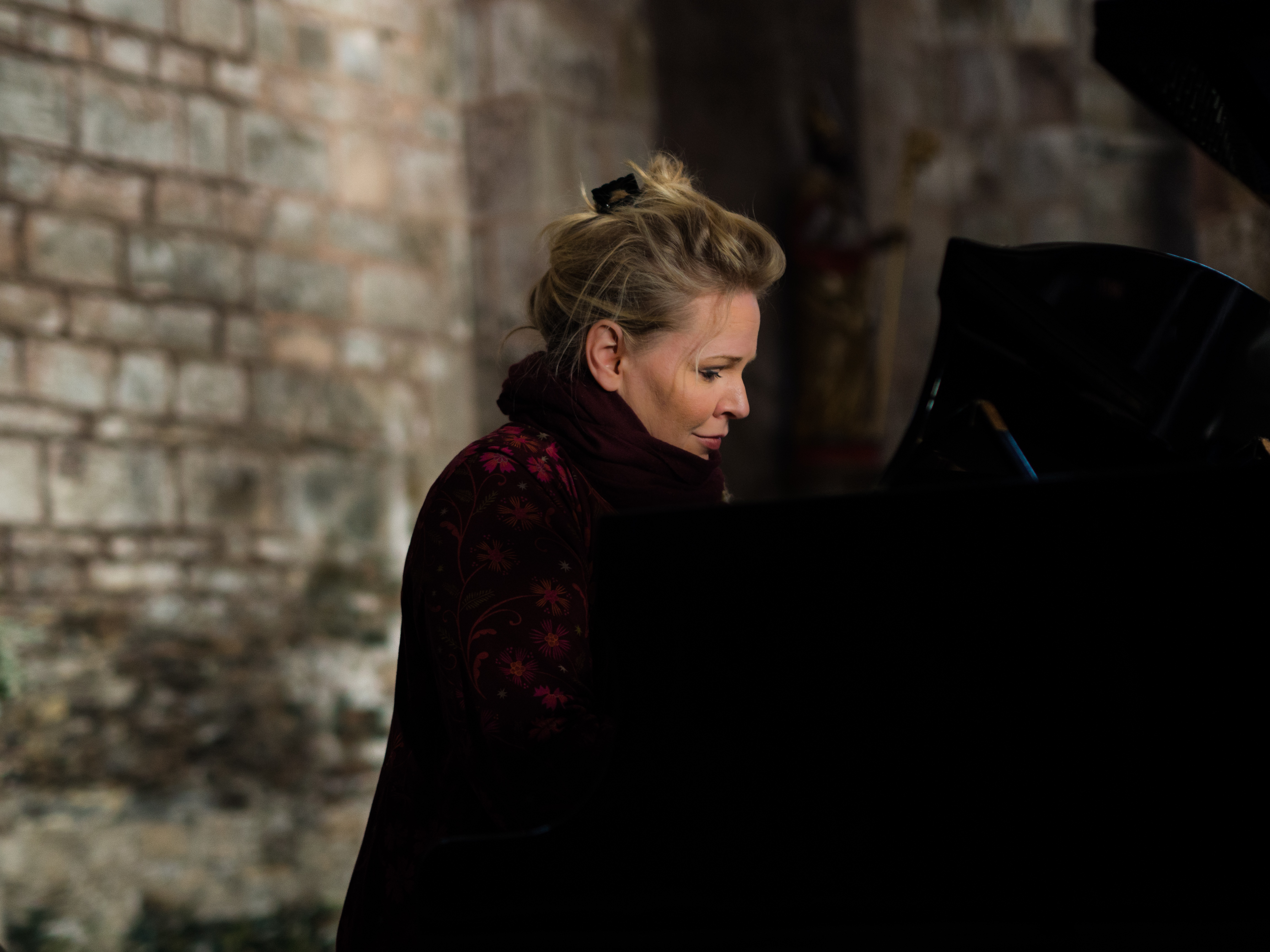 Millja Kaunisto konsertoimassa Conquesin luostarikirkossa vuonna 2016